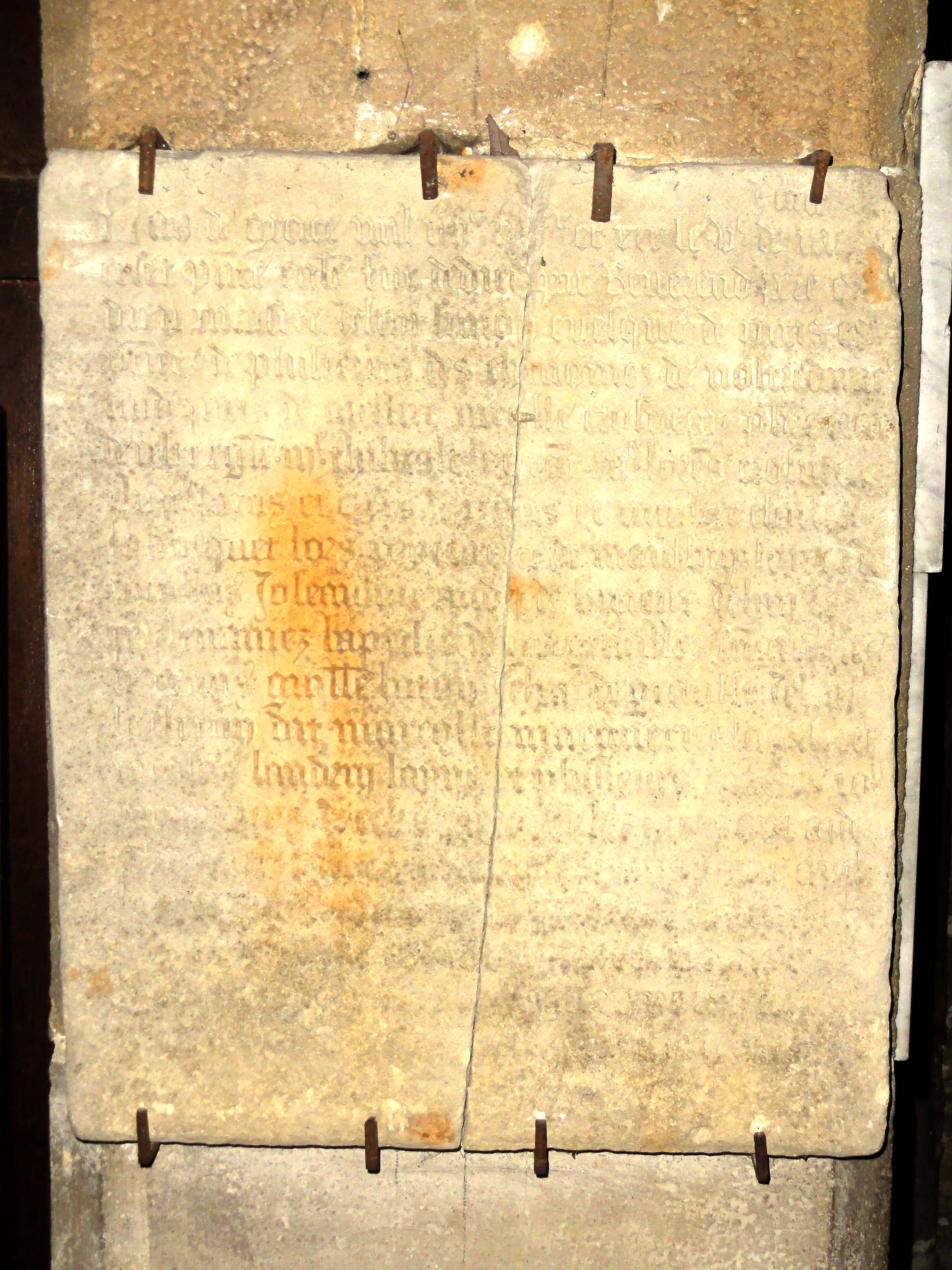 Absidiole, plaque commémorative de la consécration de l'église, le le 6 mai 1499 par Jean-Simon de Champigny, évêque de Paris.